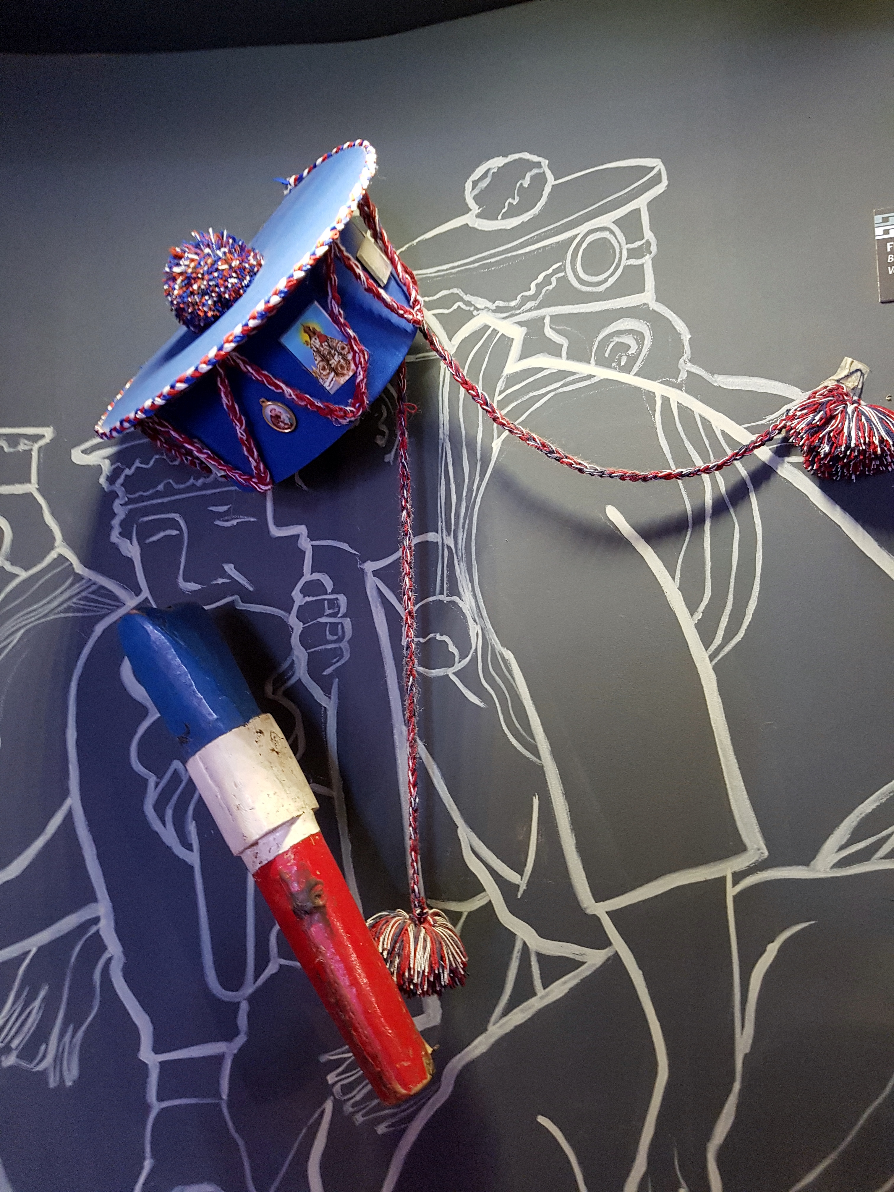 Gorro y flauta típicos de la cofradía Baile Chino Virgen del Carmen del Rosario de Valle Hermoso, Museo de La Ligua.